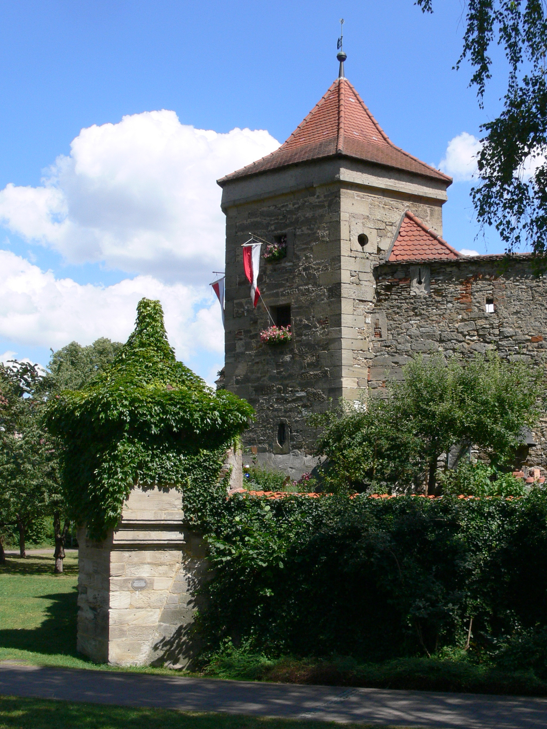 Pulverturm an der Nordwestecke der Weißenburger Stadtbefestigung.